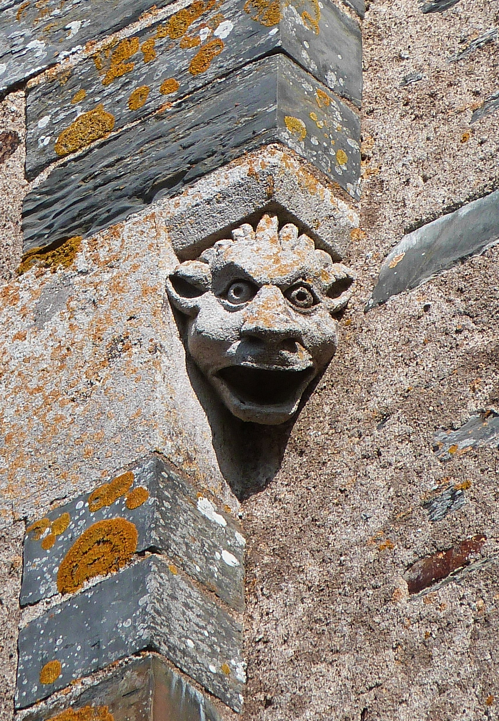 Masque grimaçant d'un modillon de l'église de Treffieux A